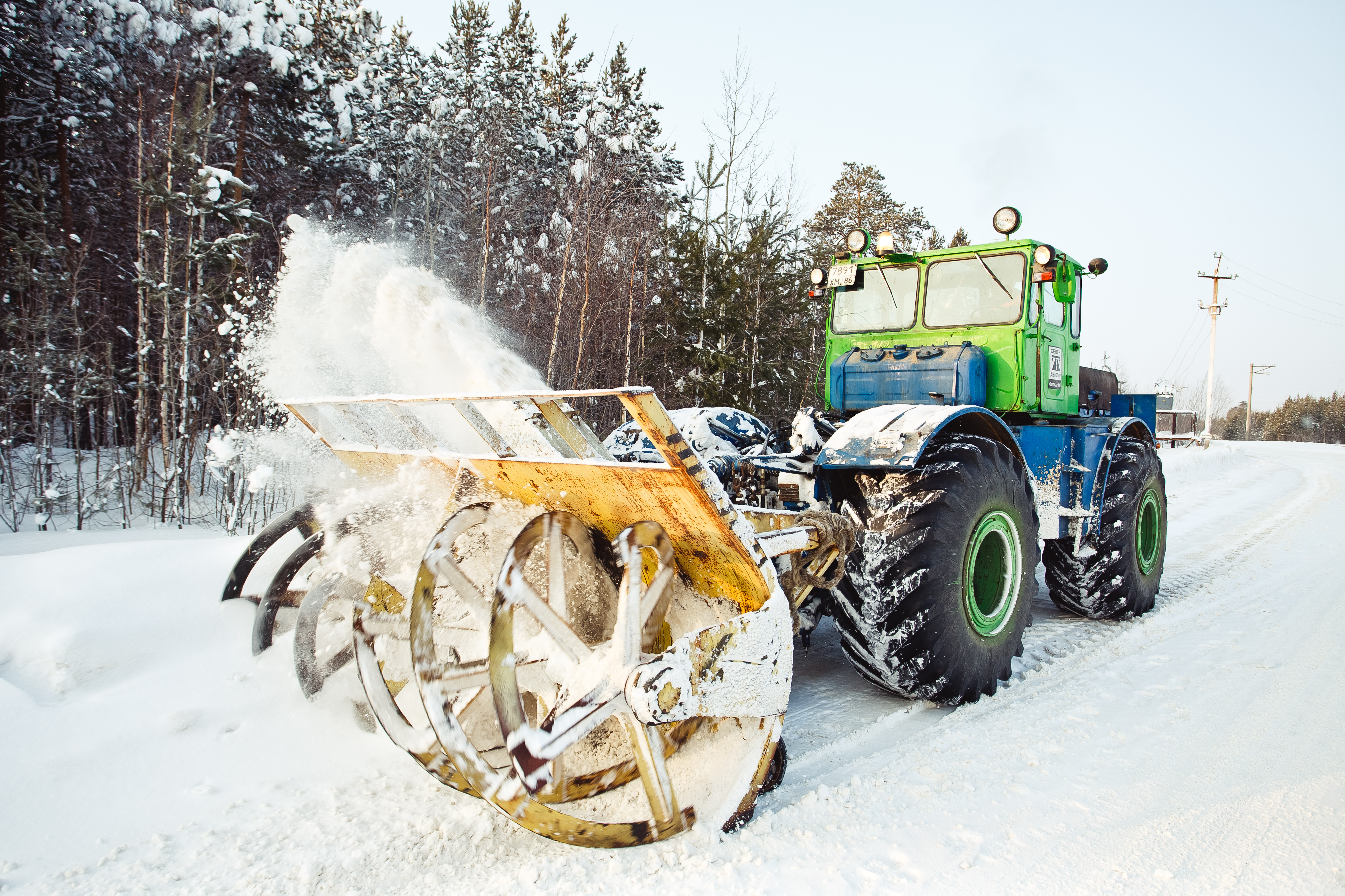 Содержание автозимников, ХМАО, дороги